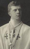 El príncipe Fernando María de Baviera (1884-1958)